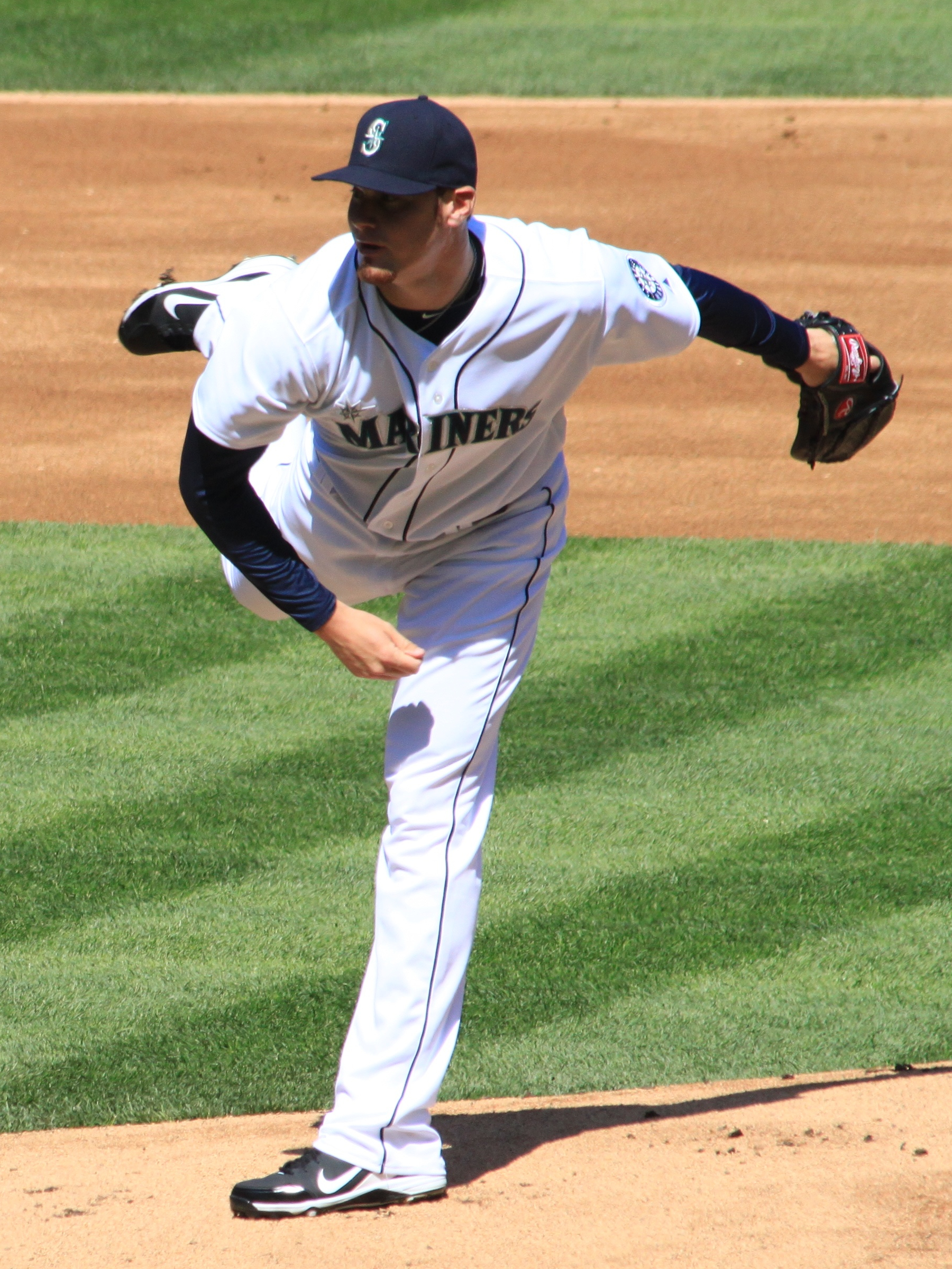 Blake Beavan